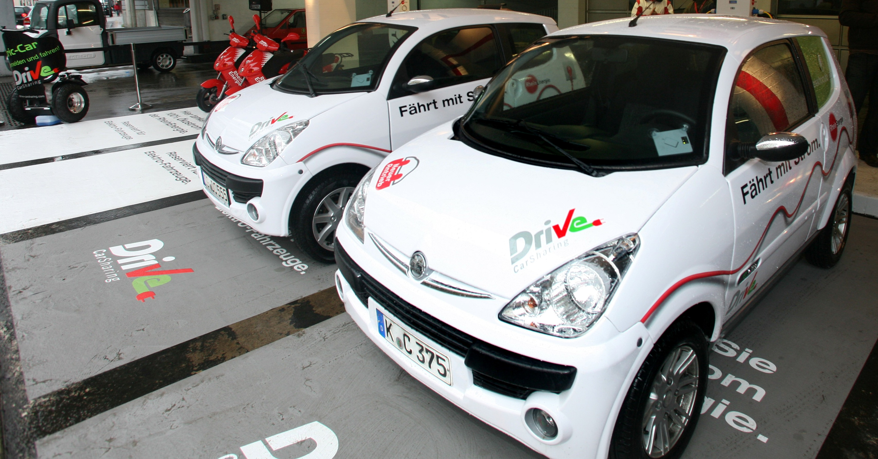 Die zwei Elektroautos der Drive Carsharing Flotte in Köln am Neumarkt.